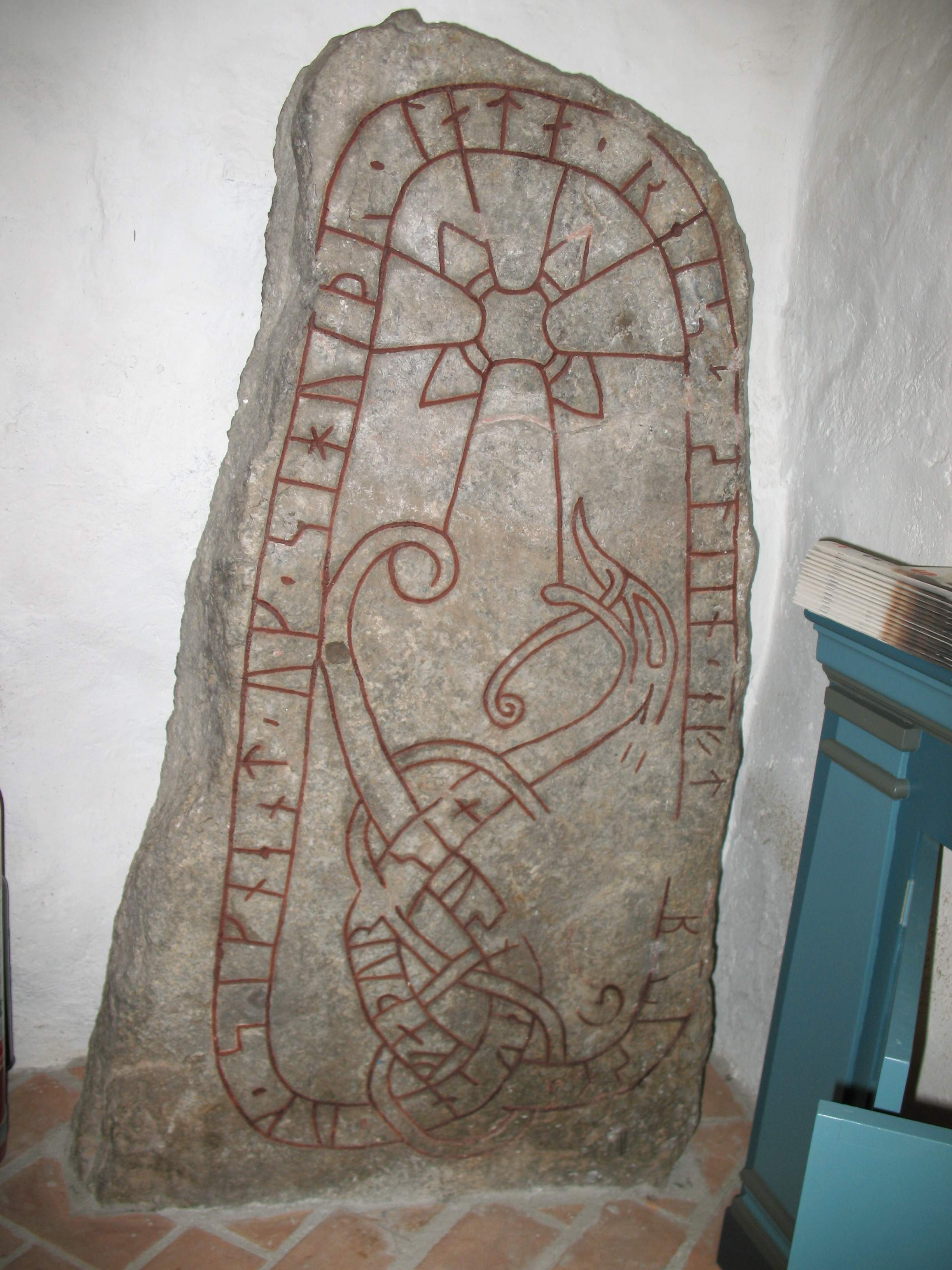 Runstenen U 333 i Orkesta kyrka, Orkesta socken, Vallentuna kommun.